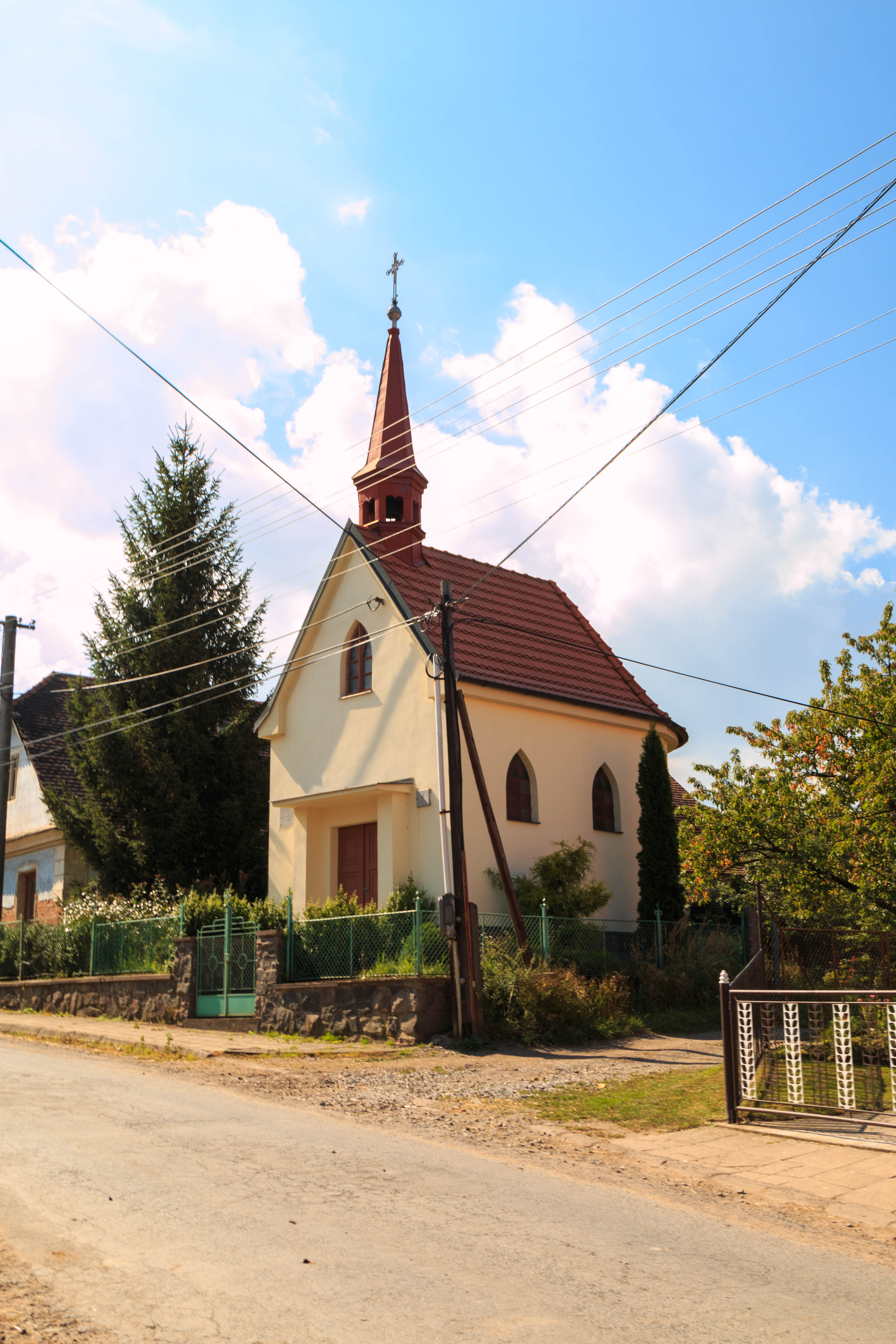 Zhoř u Skutče - kaple